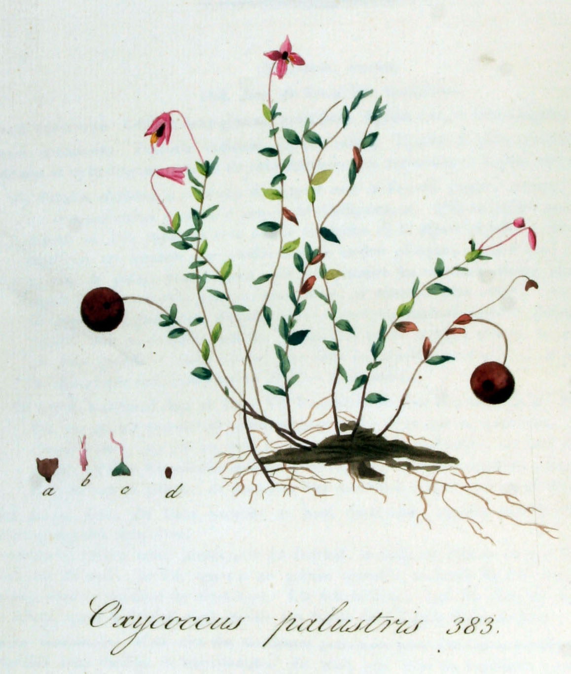 Vaccinium oxycoccos L. (Syn. Oxycoccus palustris Pers.)